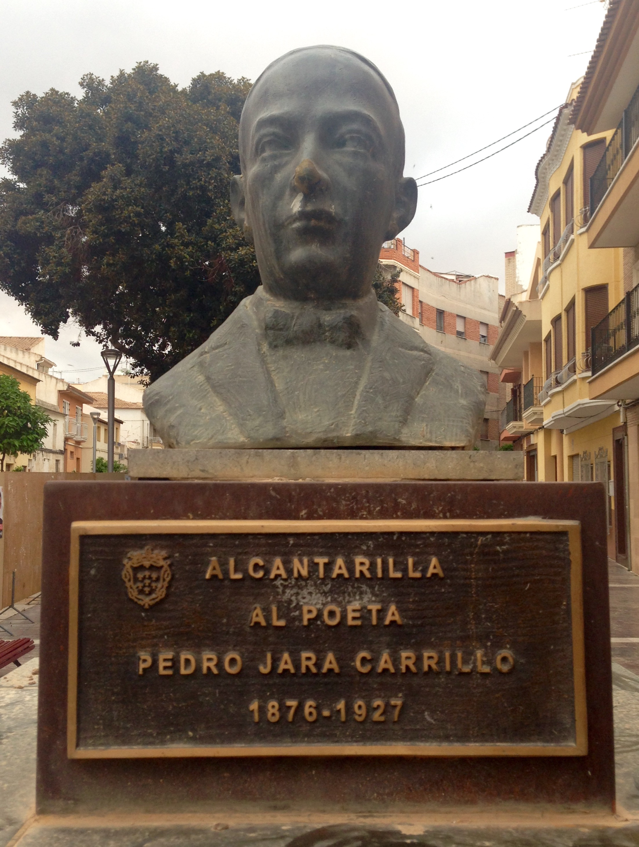 Busto de bronce de Jara Carrillo situado en una plaza de Alcantarilla que también lleva su nombre